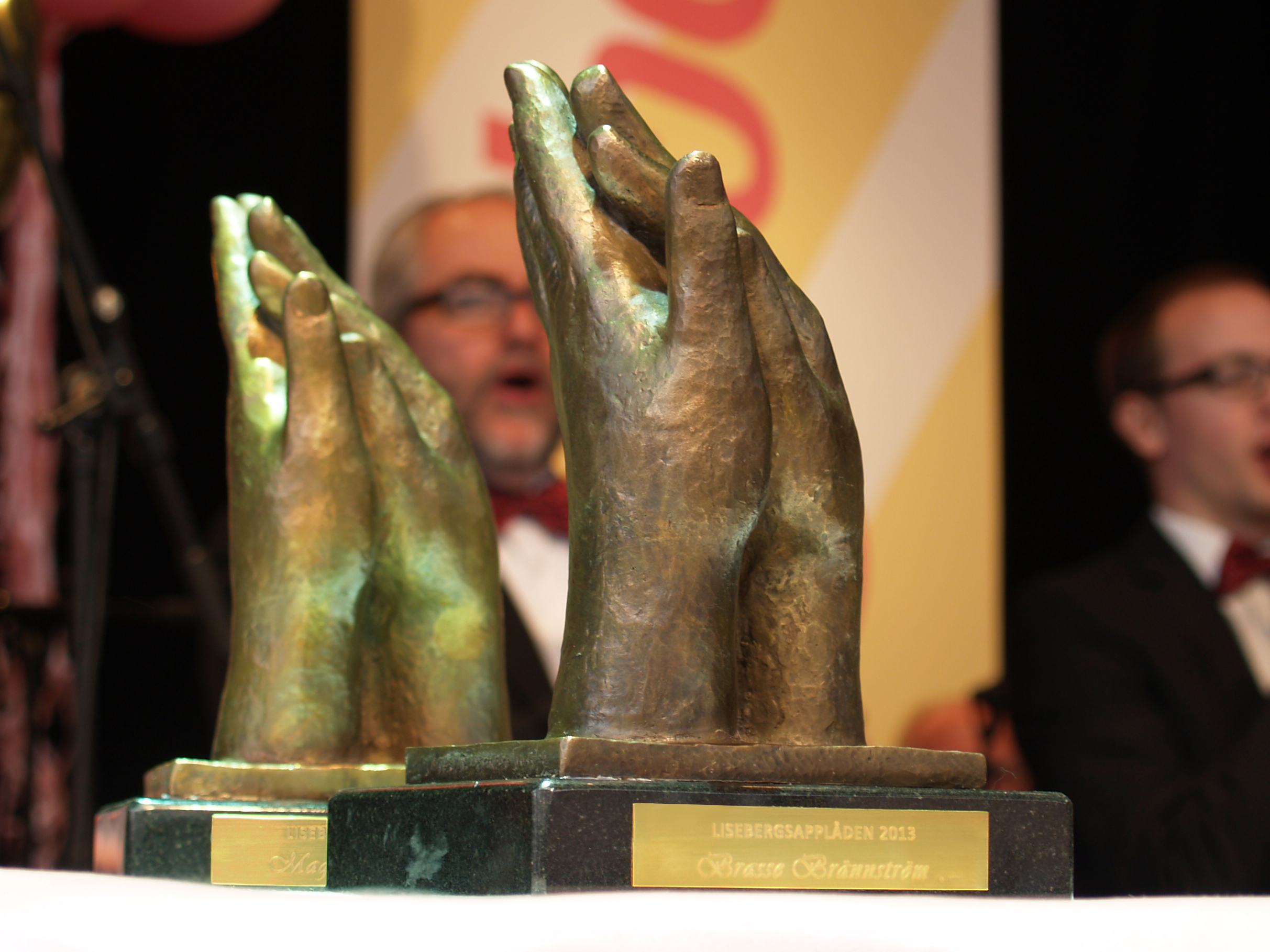 2013 års Lisebergsapplåd(er) till Brasse Brännström och Magnus Härenstam.